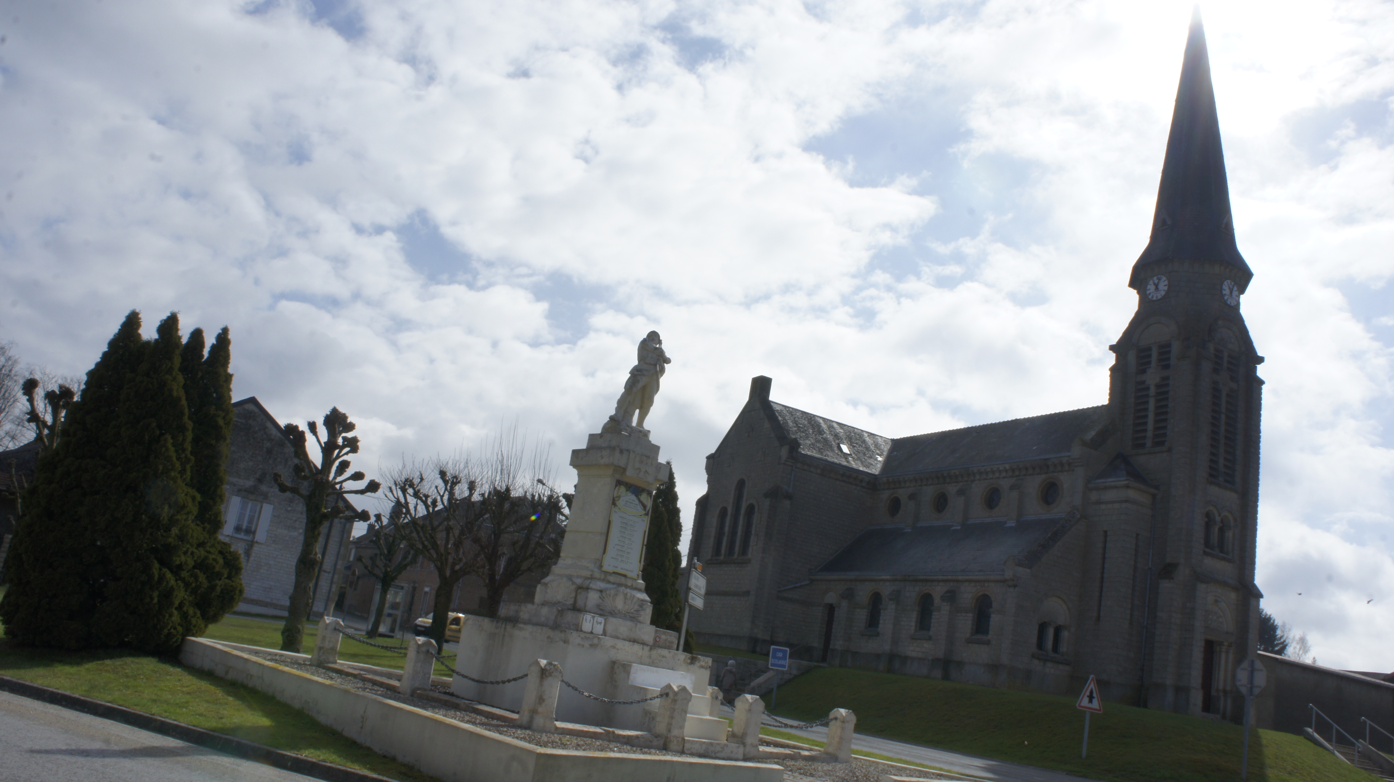 Saint_Etienne_à_Arnes, vue de l'église et au premier plan le monument aux morts .